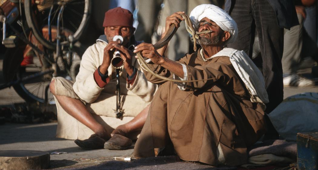 Platz Djemaa el Fna, Schlangenbeschwörer Lizenz